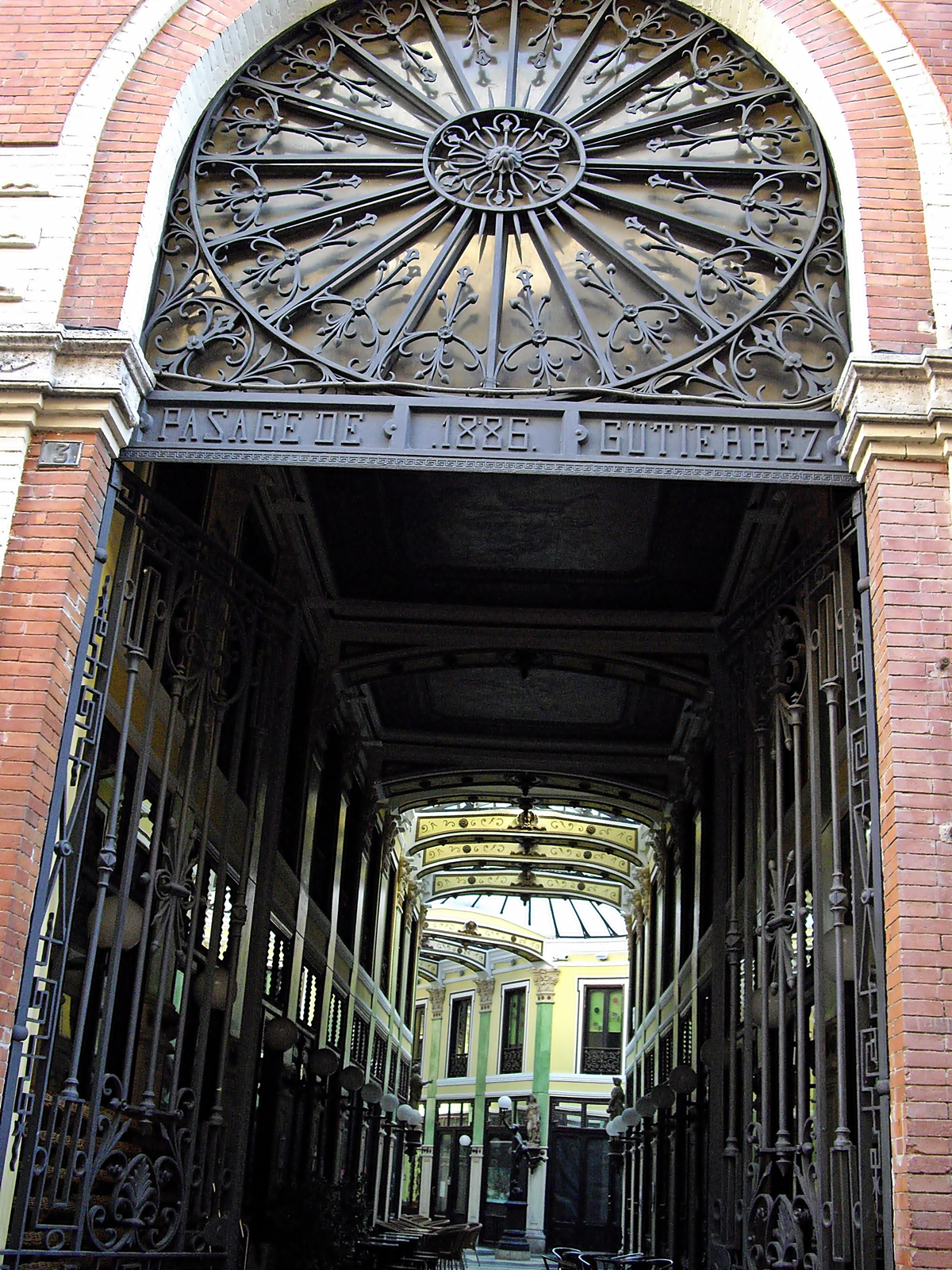 Portada del pasaje Gutierrez con la fecha de construcción impresa